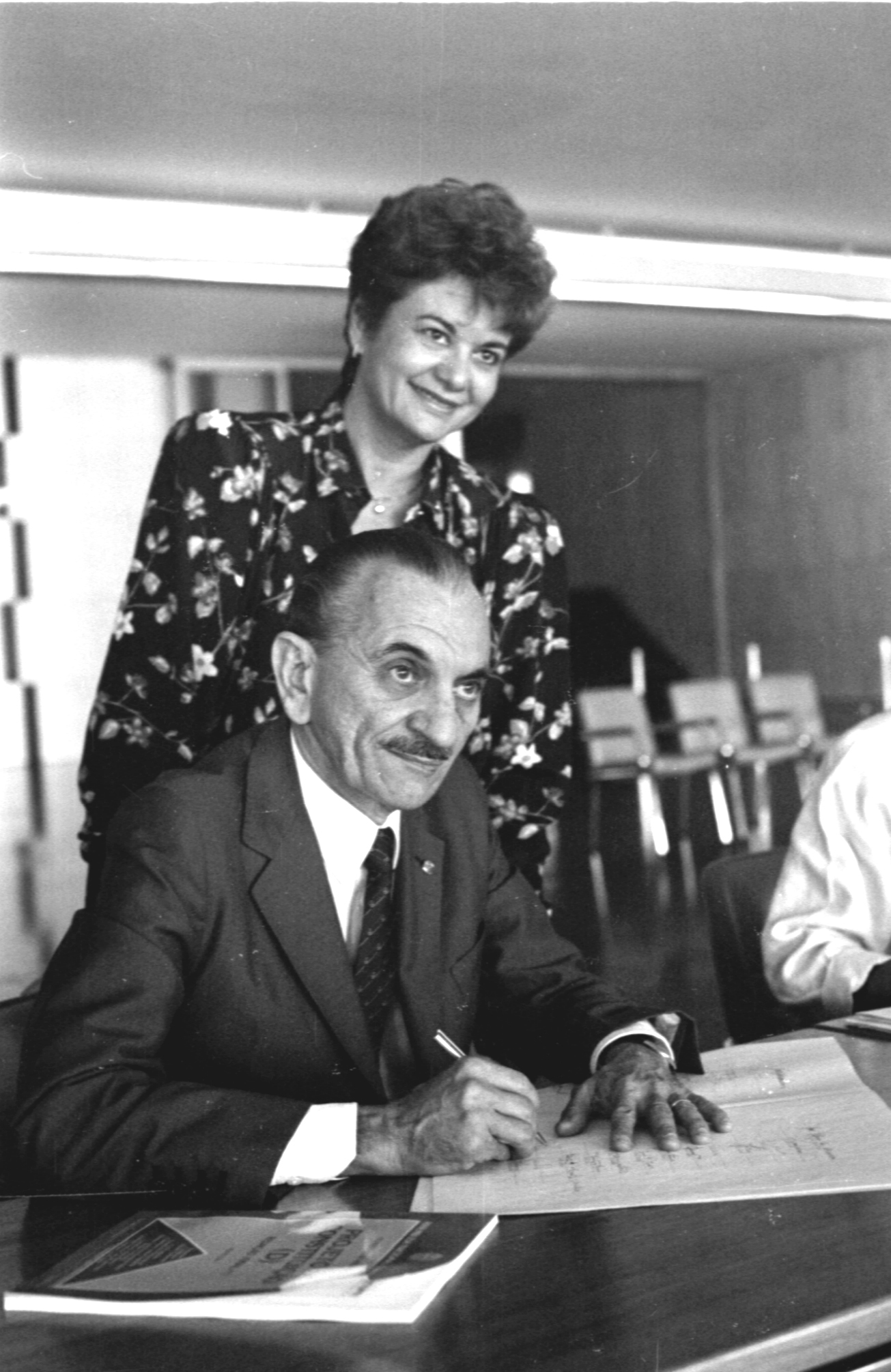 Assinatura da Constituição em 29/09/1988. Participantes - Senador Lavoisier Maia. Foto: Célio Azevedo